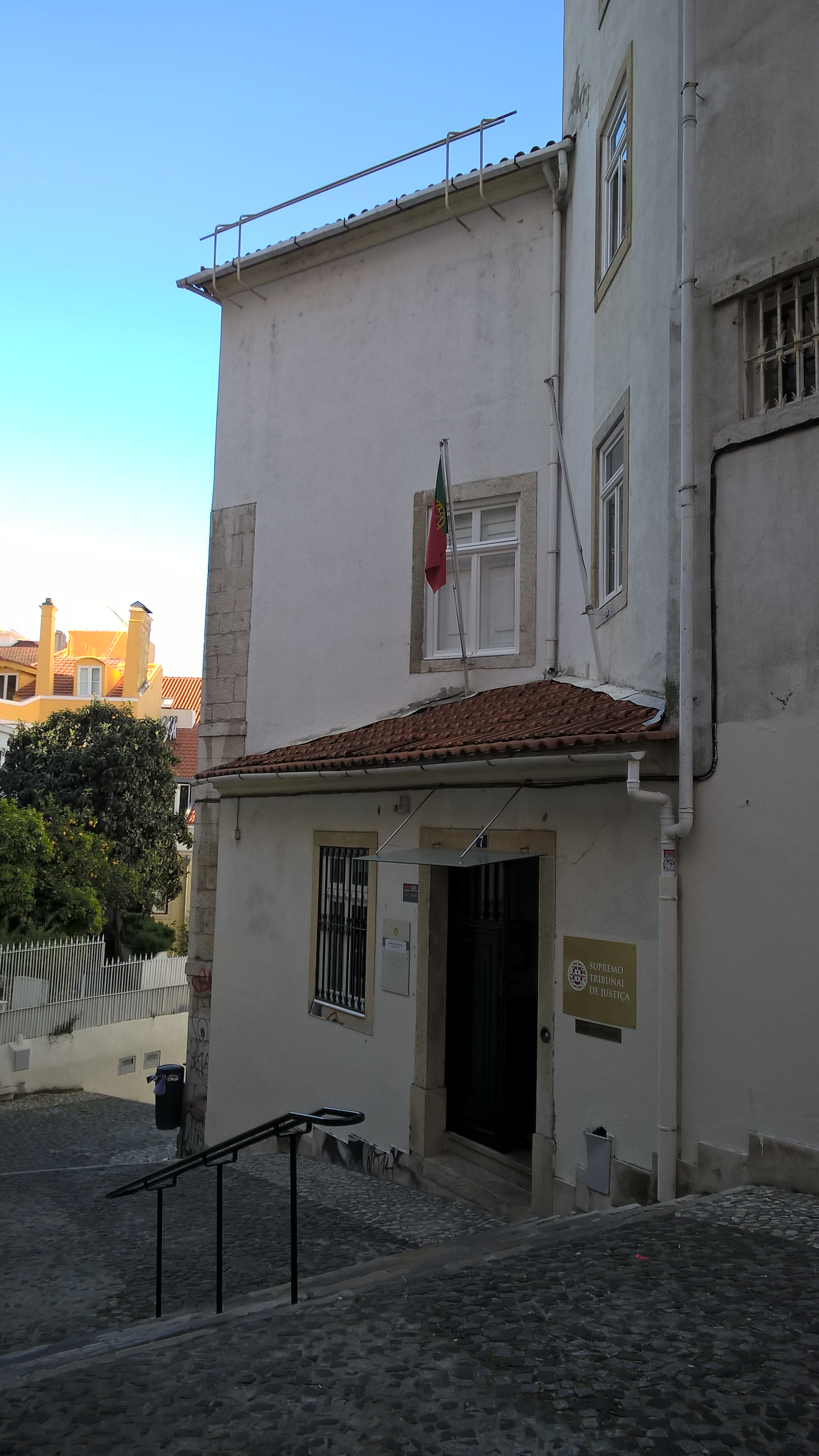 Supremo Tribunal de Justiça sede actual (Instalações Provisórias) nas Escadinhas de S. Crispim, freguesia de Santa Maria Maior, em Lisboa